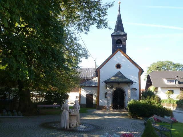 Ortskapelle Hl. Dreifaltigkeit